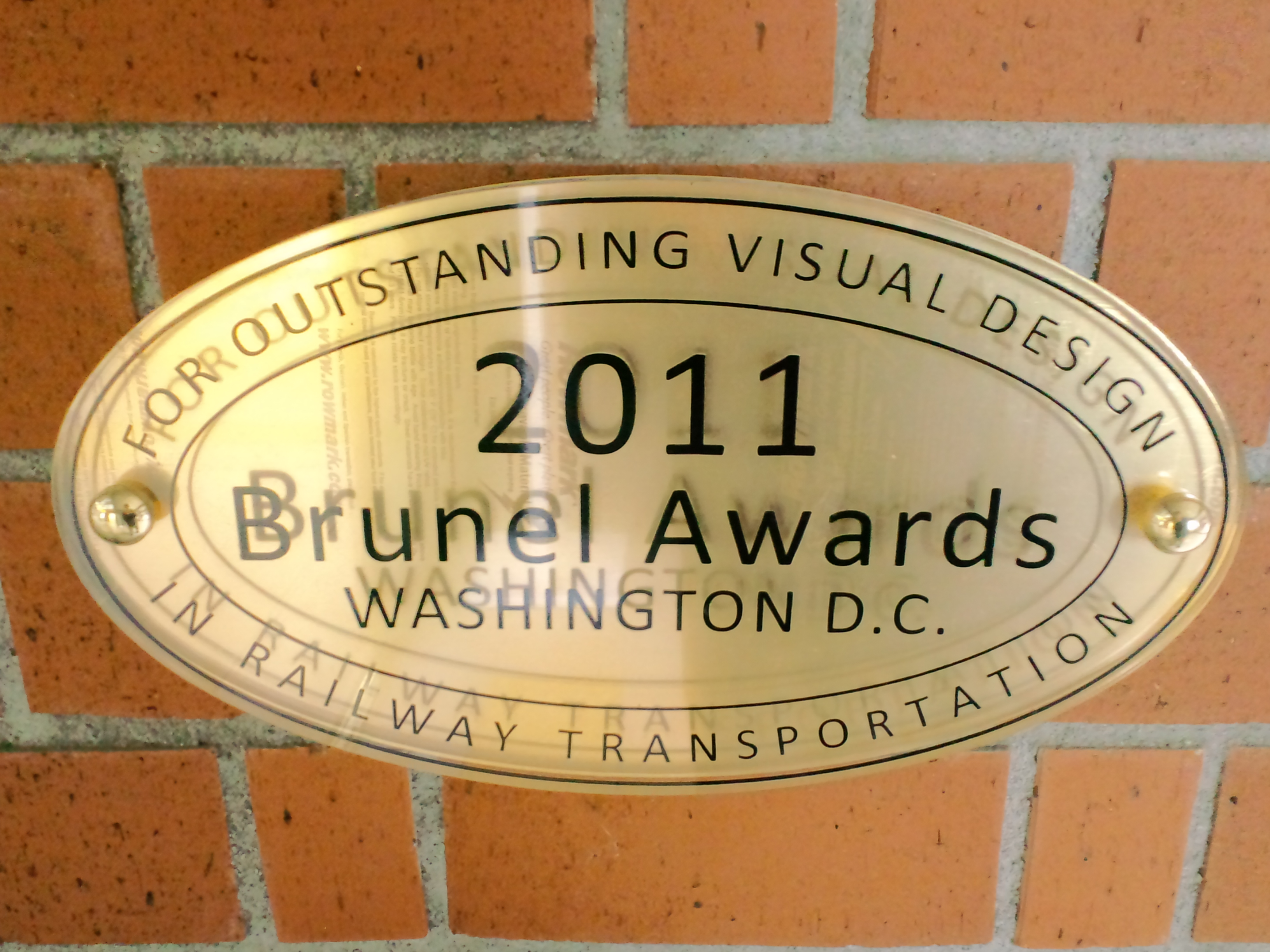 岩見沢複合駅舎のブルネル賞受賞記念プレート